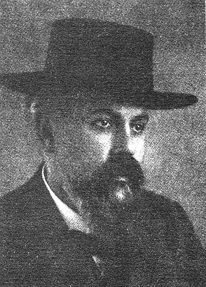 Foto Ephraim Carlebach / gest. 1936